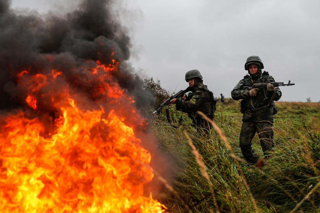 Сухопутные подразделения Балтийского флота выполнили боевые стрельбы в рамках ССУ «Запад-2017».